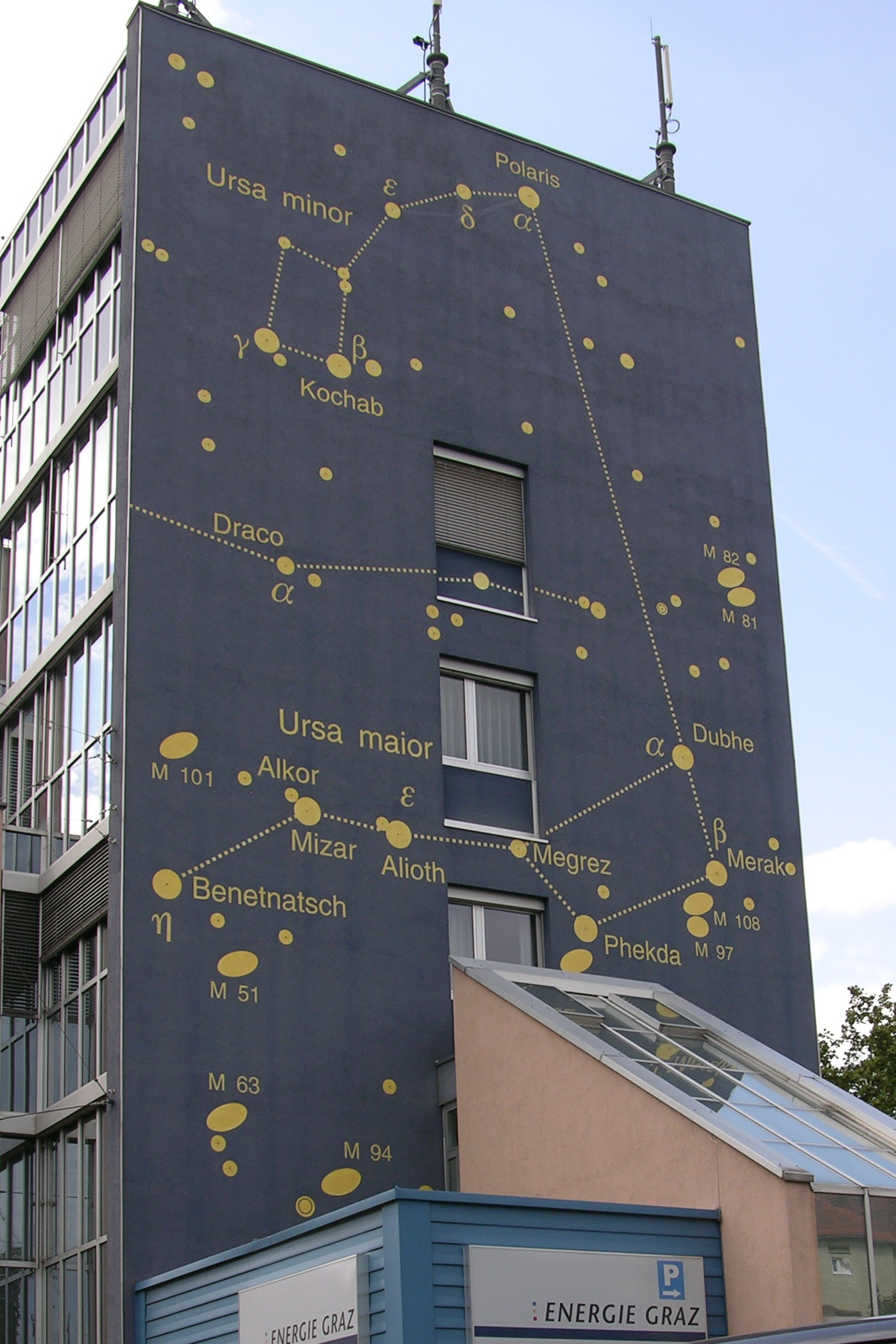 Fassade des Verwaltungsgebäudes der Energie Graz, Schönaugürtel 65, 8010 Graz